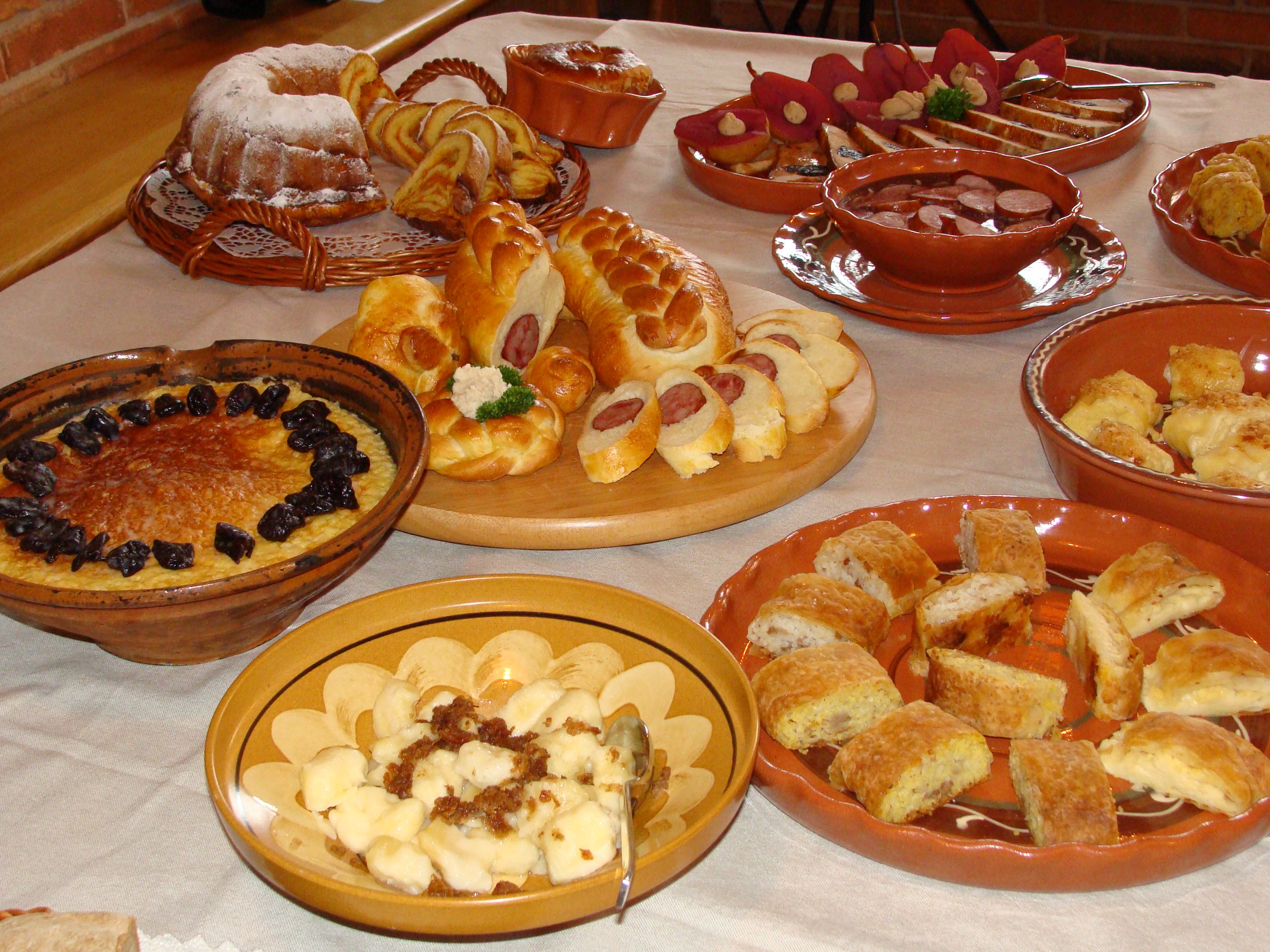 lokalne kulinarične dobrote